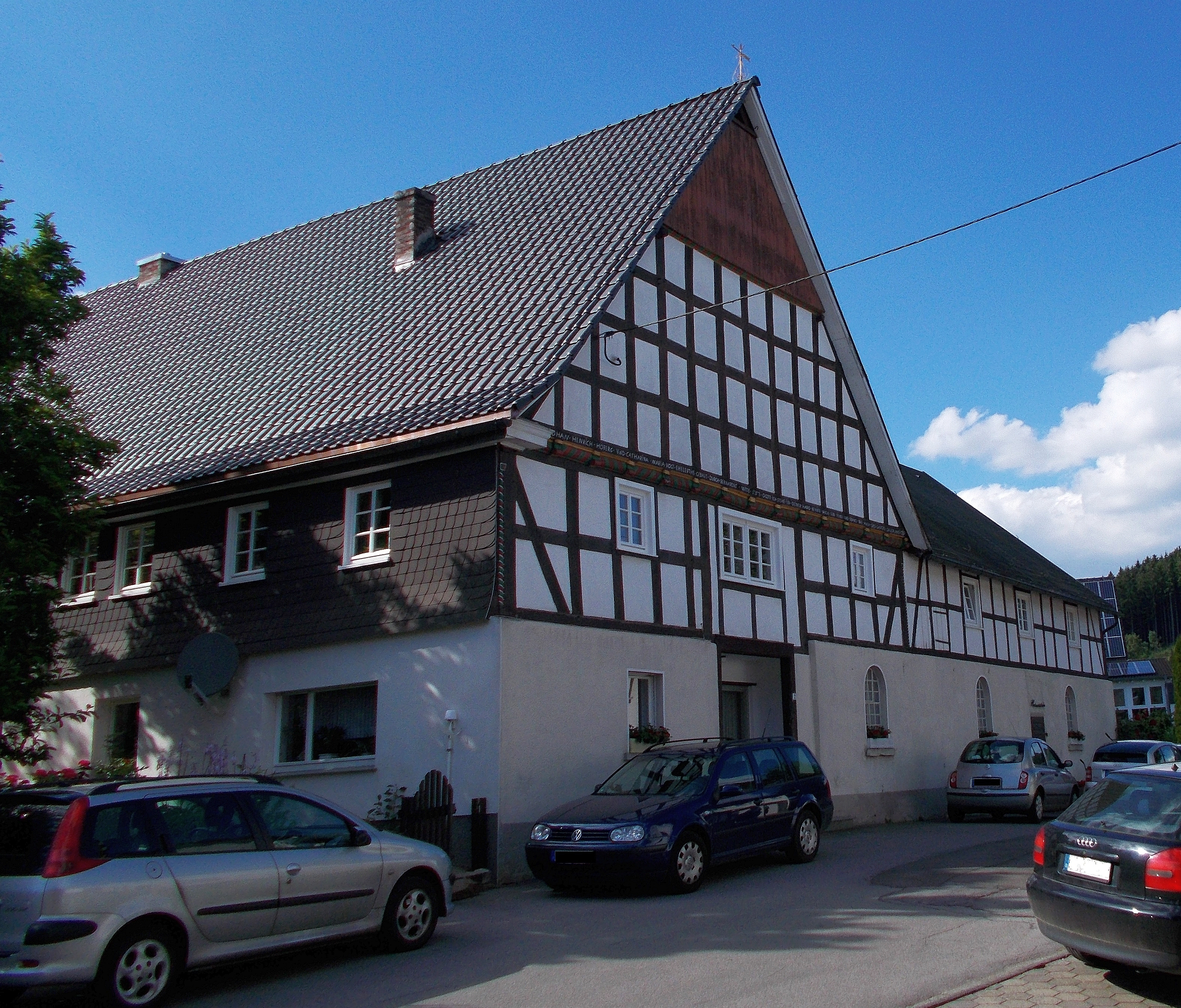 Museum Heimatstube in Finnentrop-Schönholthausen, denkmalgeschützt ist die zugewandte giebelseitige Fassade des ehemaligen Hofhauses (Zur Schlerre 2)